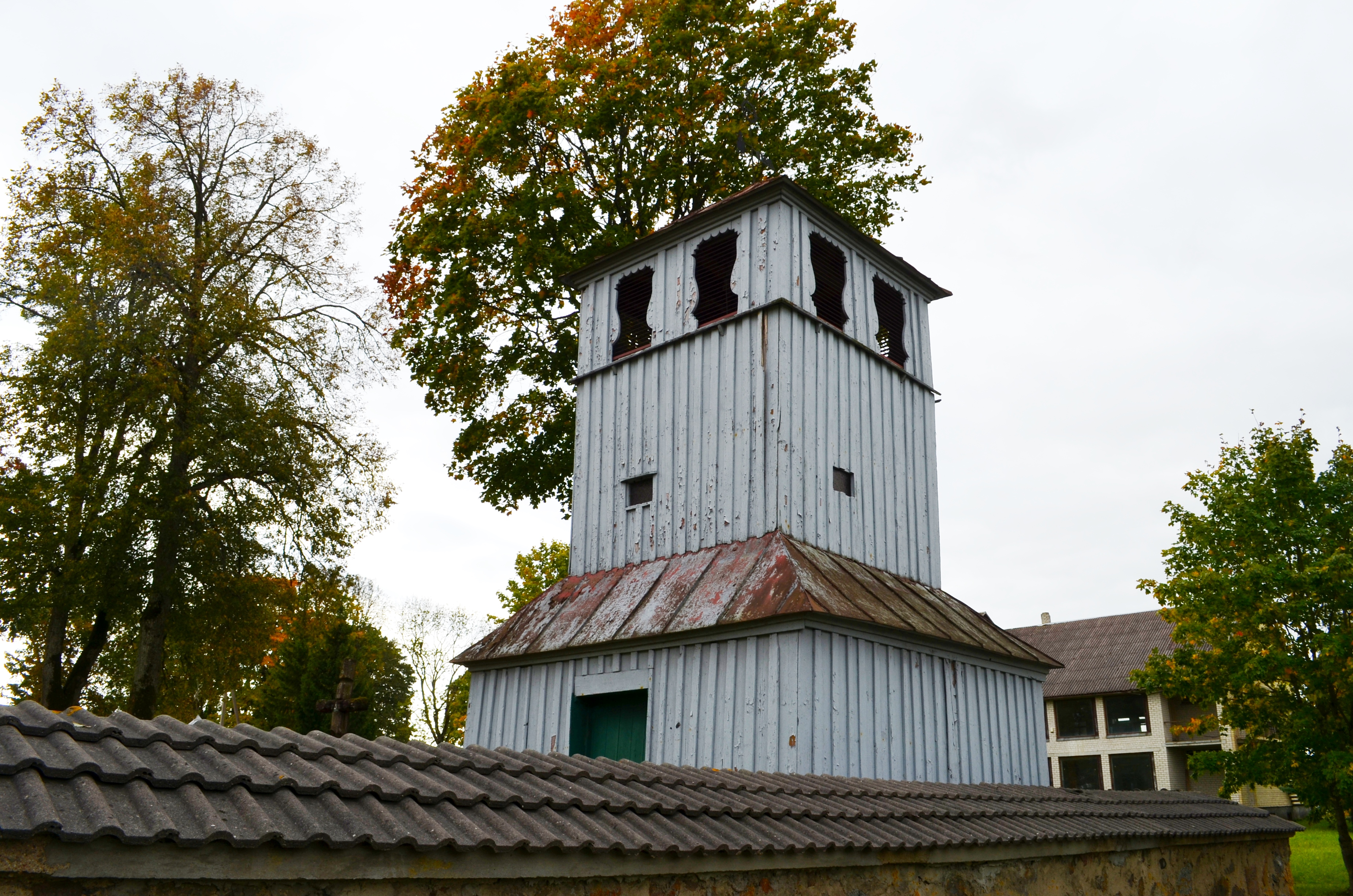 Karklėnų bažnyčios varpinė, Kelmės raj.